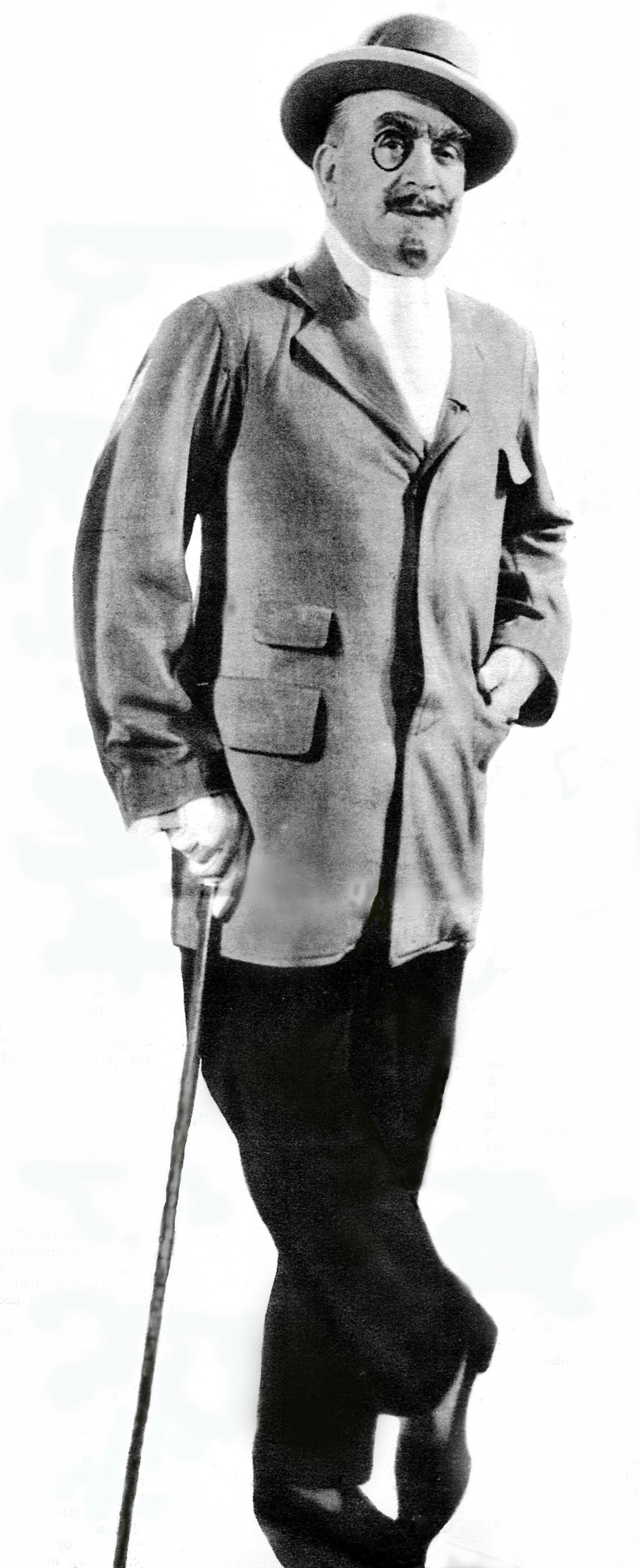 Armando Falconi come appare nel film "E' tornato Carnevale" (Matarazzo, 1937)